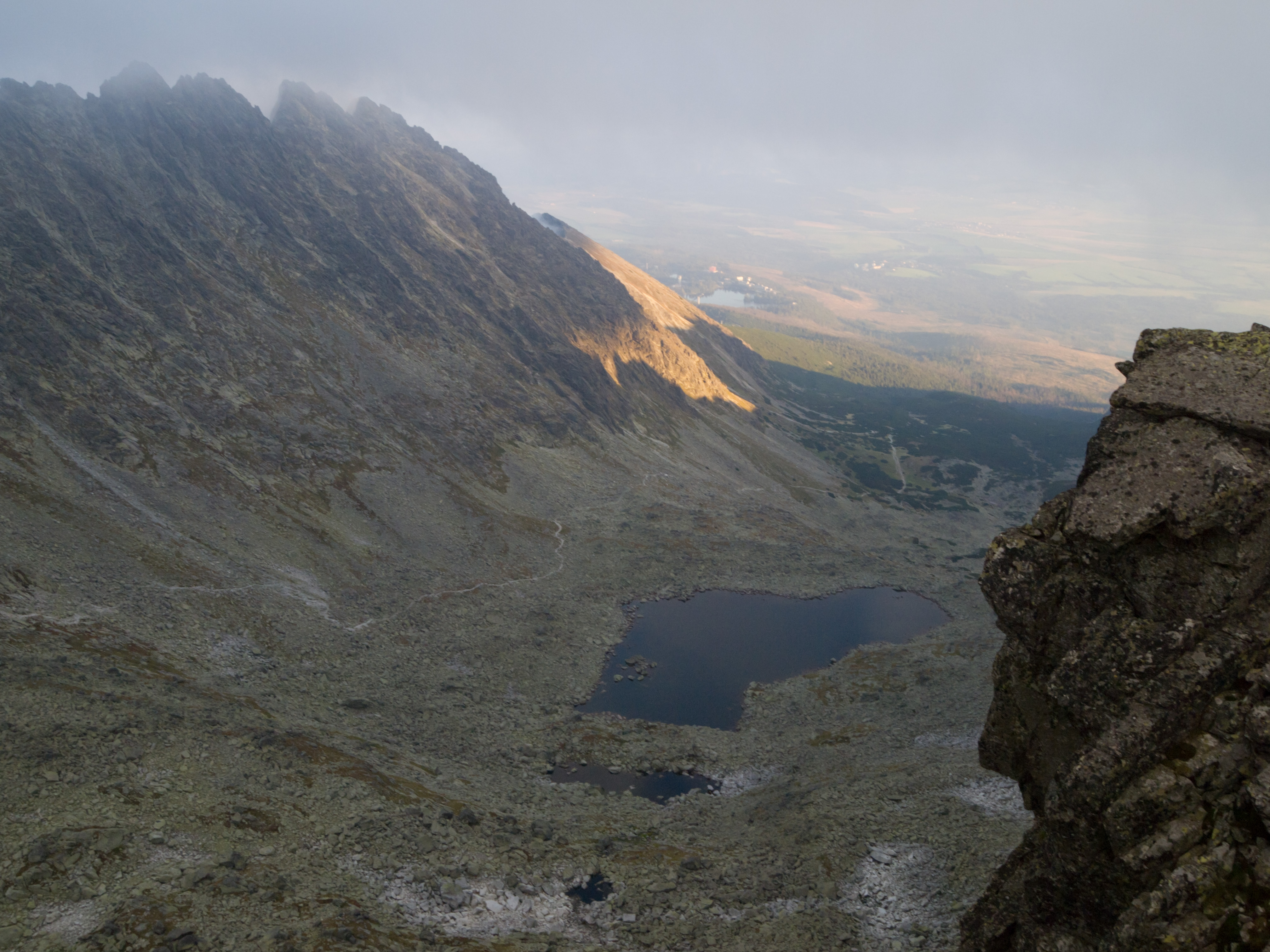 Soliskowe Oko, Soliskowy Stawek i Niżni Wielki Furkotny Staw w Dolinie Furkotnej.